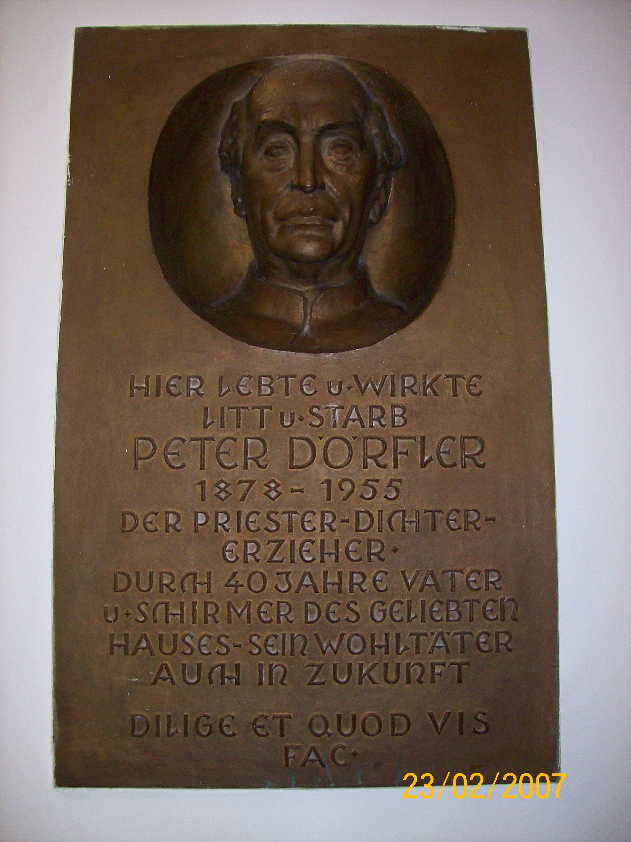 Gedenktafel St. Marien-Ludwig-Ferdinand-Heim